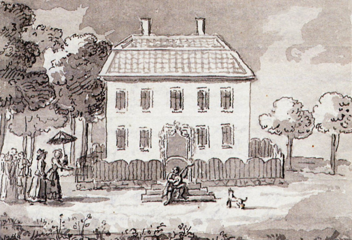 Heleneberg på en samtida lavering av Pehr Hilleström och var ett putsad tvåvånings trähus med brutet och valmat tak. På entrétrappan sitter Carl Michael Bellman och välkomnar fru Helena Quiding till Heleneberg den 31 juli 1792